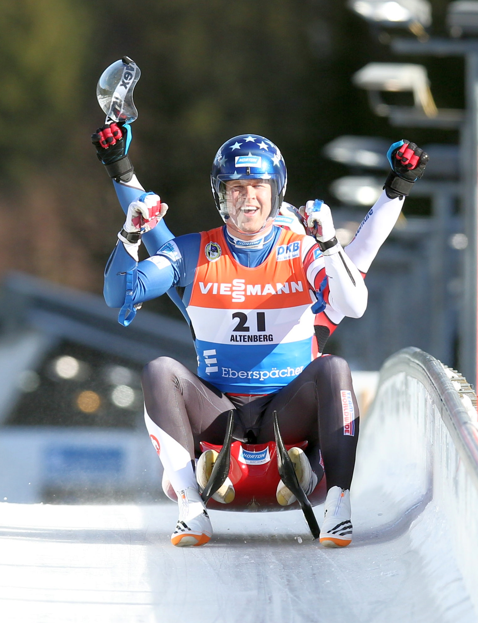 Matt Mortensen und Jayson Terdiman beim Rennrodel-Weltcup der Doppelsitzer in Altenberg 2017